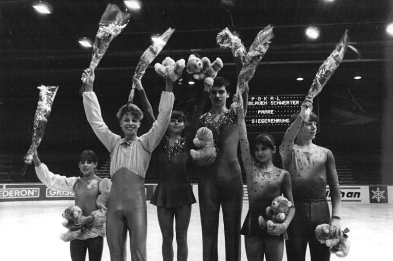 Eiskunstläufer, UdSSR, DDR ADN-ZB Thieme 17.11.84 Karl-Marx-Stadt: Pokal der Blauen Schwerter-Siegerehrung für das Paarlaufen im Junioreneiskunstlaufwettbewerb: Platz 1 belegte das sowjetische Paar Irina Mirowenko - Dmitri Schkidtschenko (Mitte), Platz 2 Antje Schramm - Jens Müller (DDR, l.) und Platz 3 Katrin Kanitz - Alexander König (DDR).